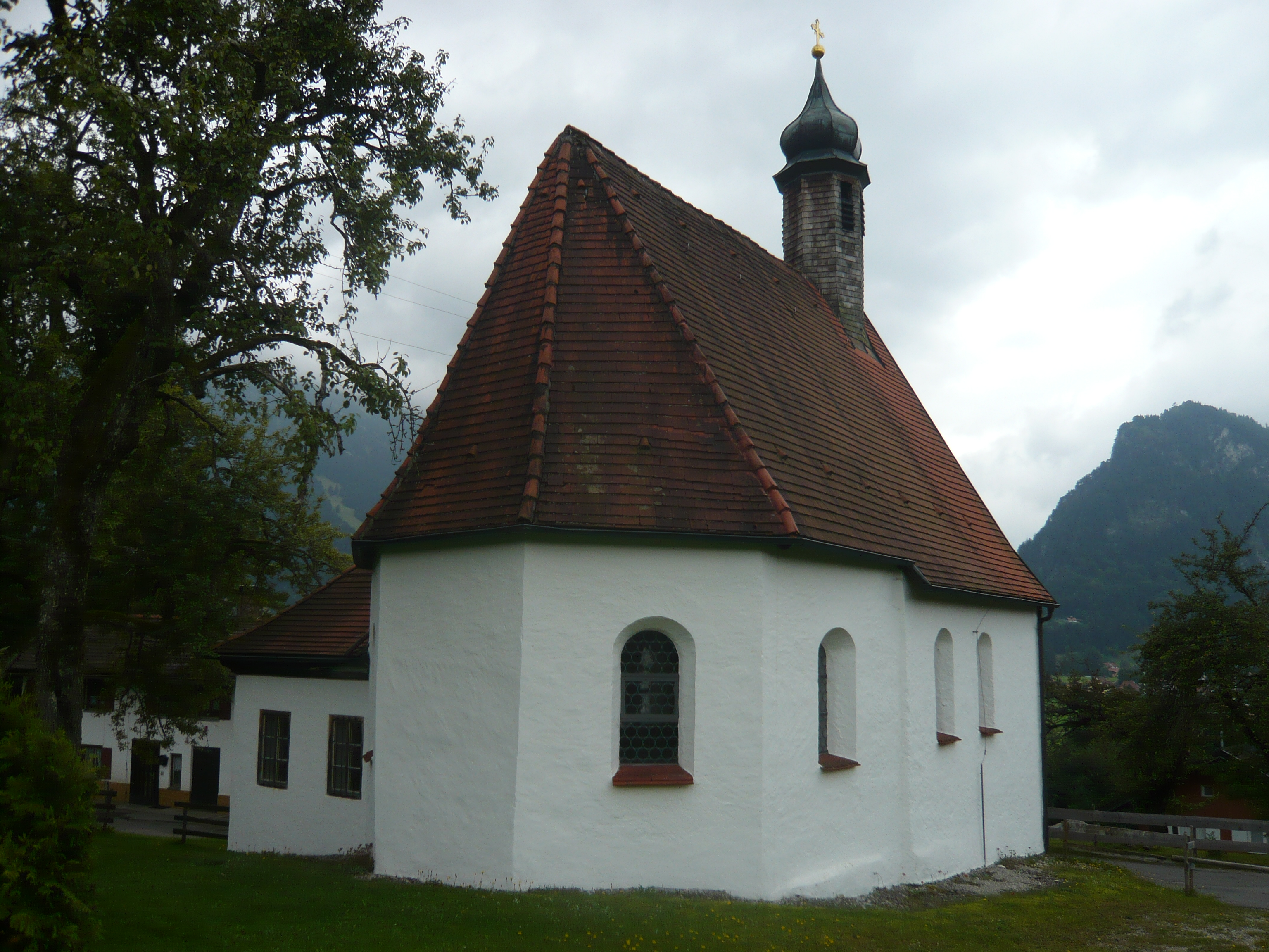 Kapelle Maria Heimsuchung in Pfronten-Meilingen (von Osten)